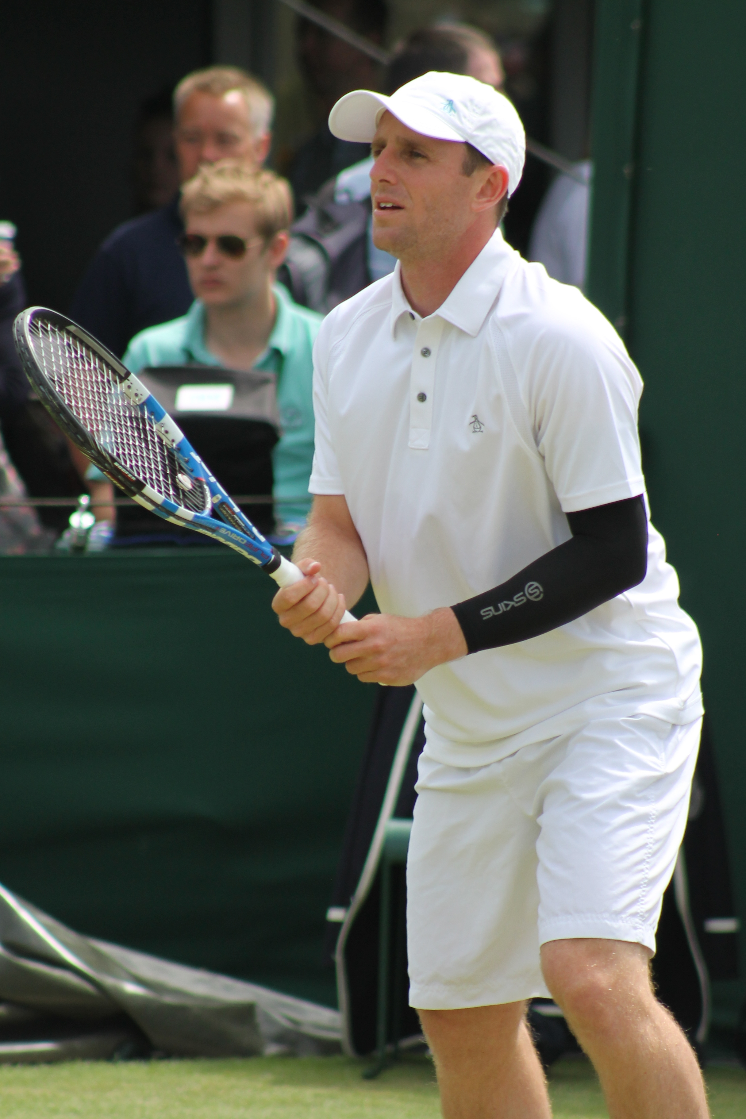 Levine WM13-011